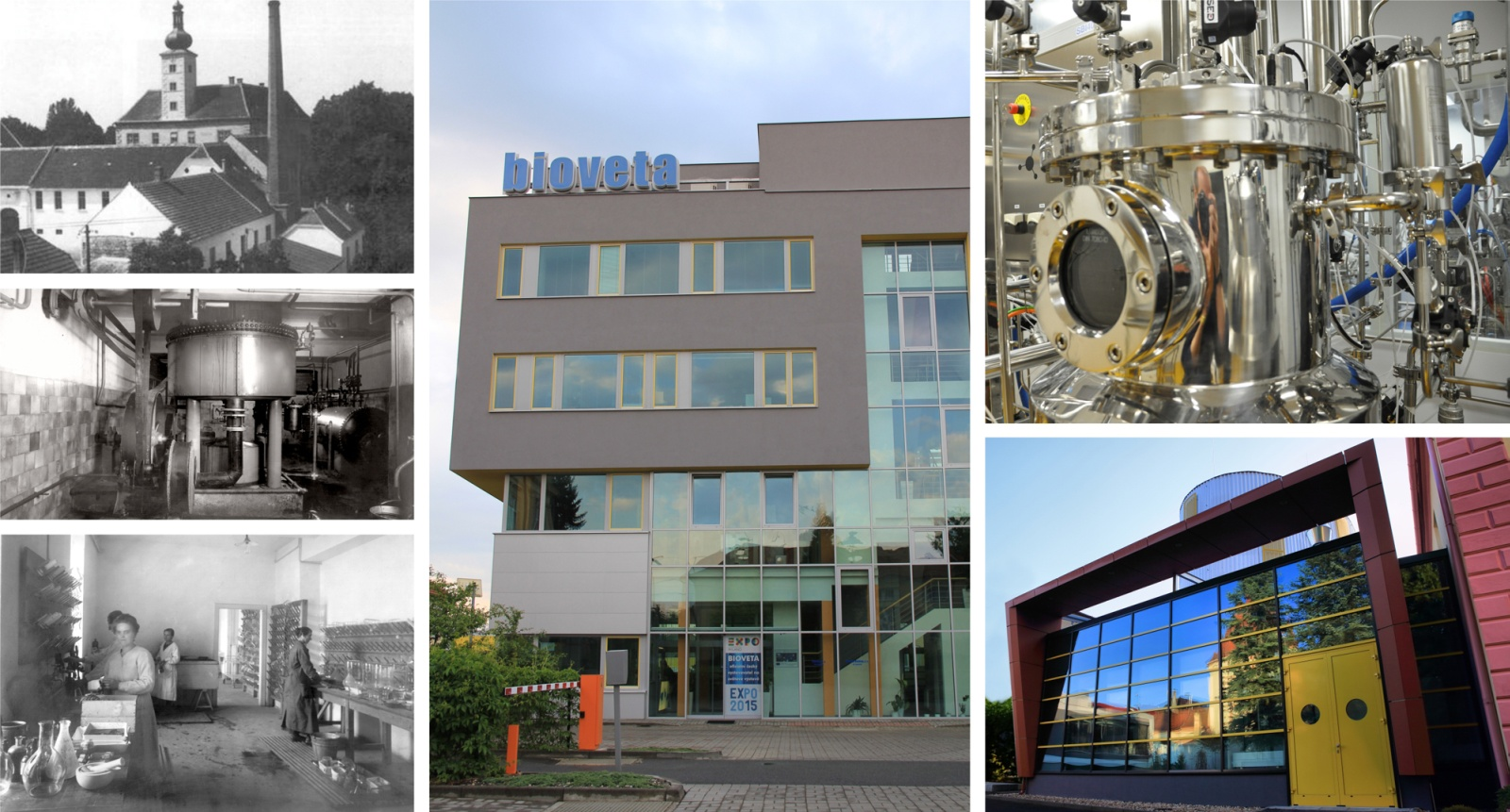 Historie + současná podoba firmy